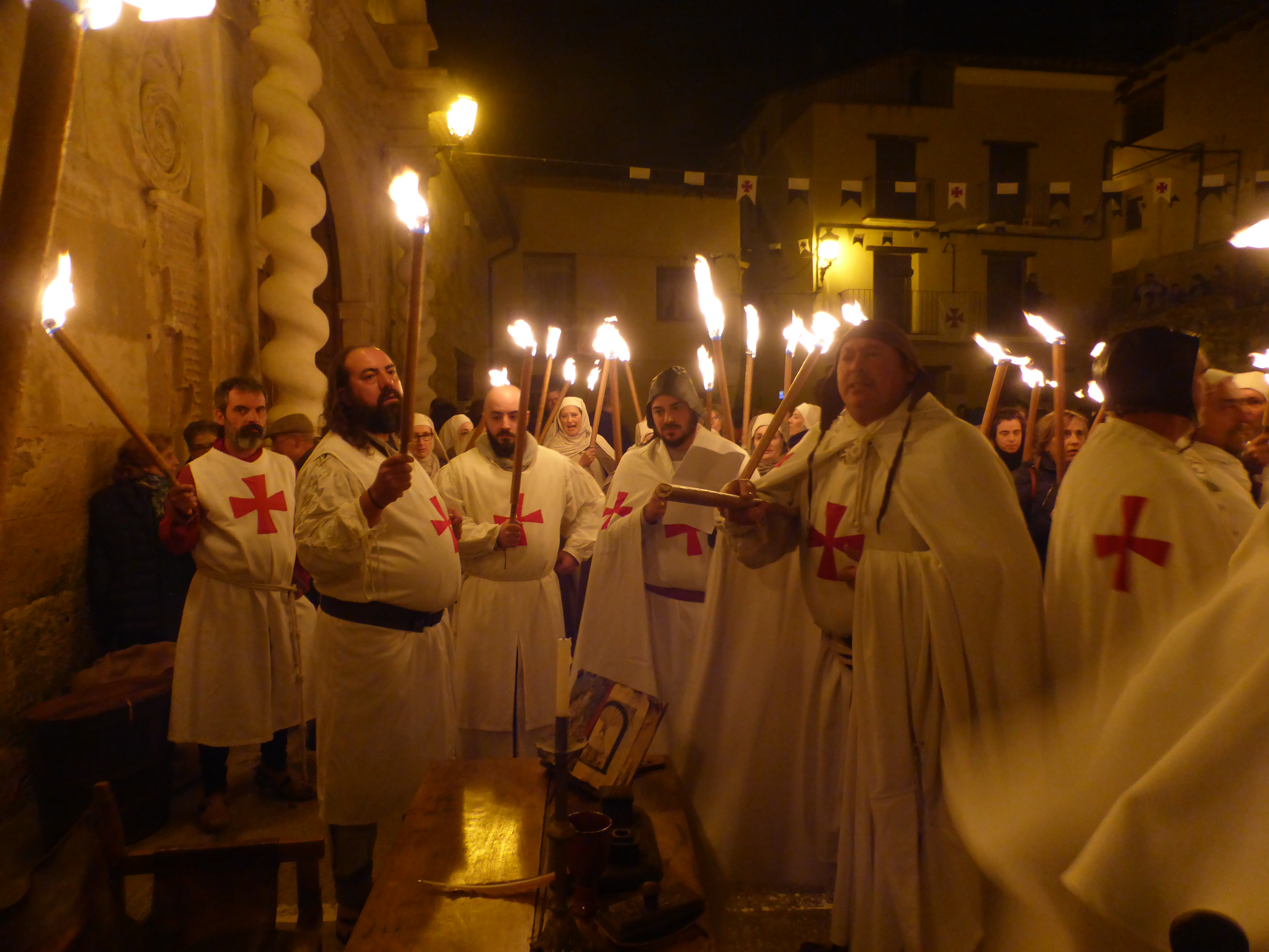 En Castellote, desde 2017, tiene lugar la recreación histórica de episodios protagonizados por los antiguos caballeros templarios. Con antorchas se sube al castillo, que perteneció a la Orden del Temple, hasta el año 1308.